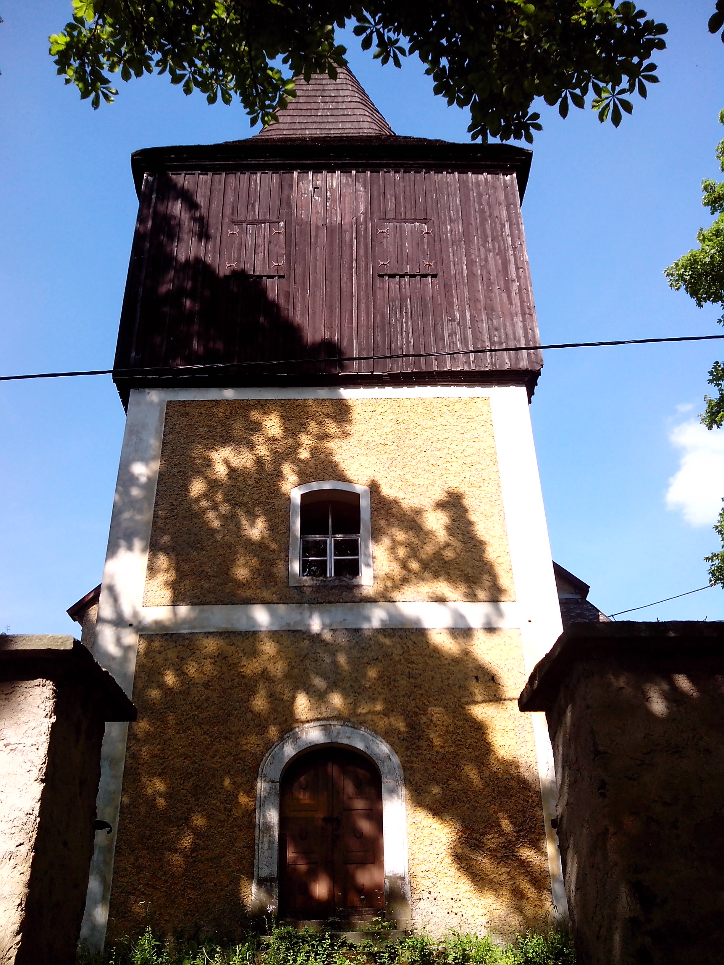 Dolní Žďár - kostel sv. Jana Křtitele